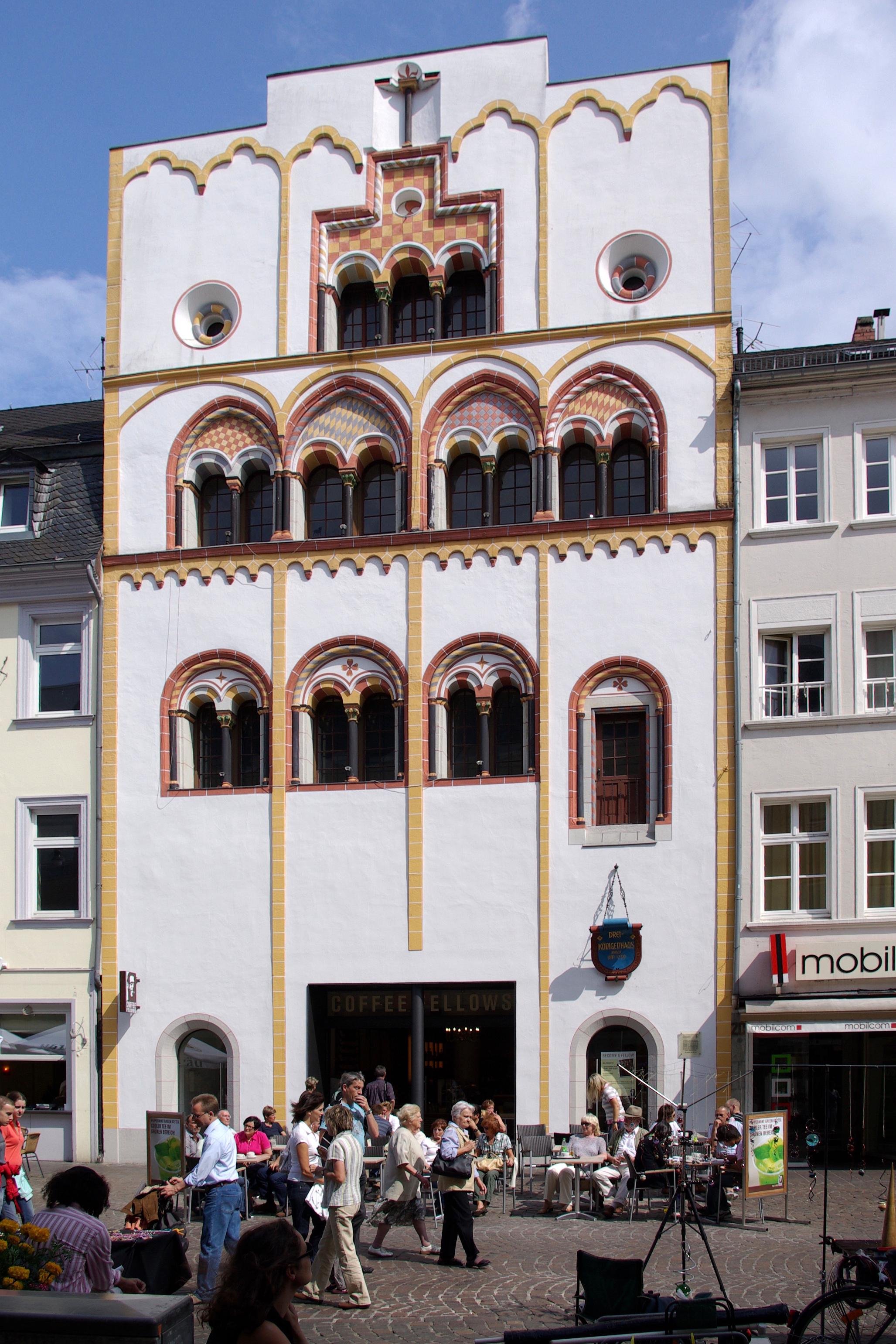 Trier, sogenanntes Dreikönigenhaus, spätromaisches wohnturmartiges Patrizierhaus, um 1220, Fassade seit dem 15. Jh. mehrfach verändert, 1938 Ladeneinbau im Erdgeschoß, Simeonstraße 19